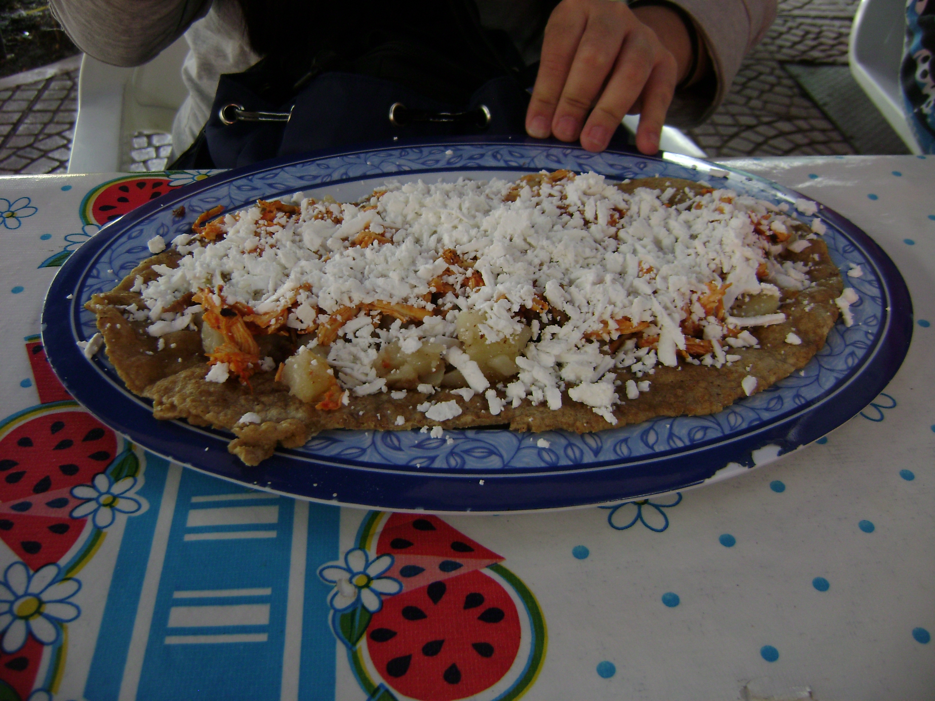 Platillo típico de la gastronomía mexicana preparado con grano de maíz. En comparación con el sope que es circular, el huarache es más alargado, similar a una elipse. Encima se le puede agregar diversos guisos al gusto. Capturada en mercado de alimentos del embarcadero de Cuemanco, delegación Xochimico, Ciudad de México.